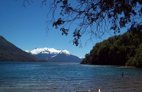 Lago Menéndez desde cerca de Puerto Chucao, al fondo el cerro Torrecillas y su glaciar.